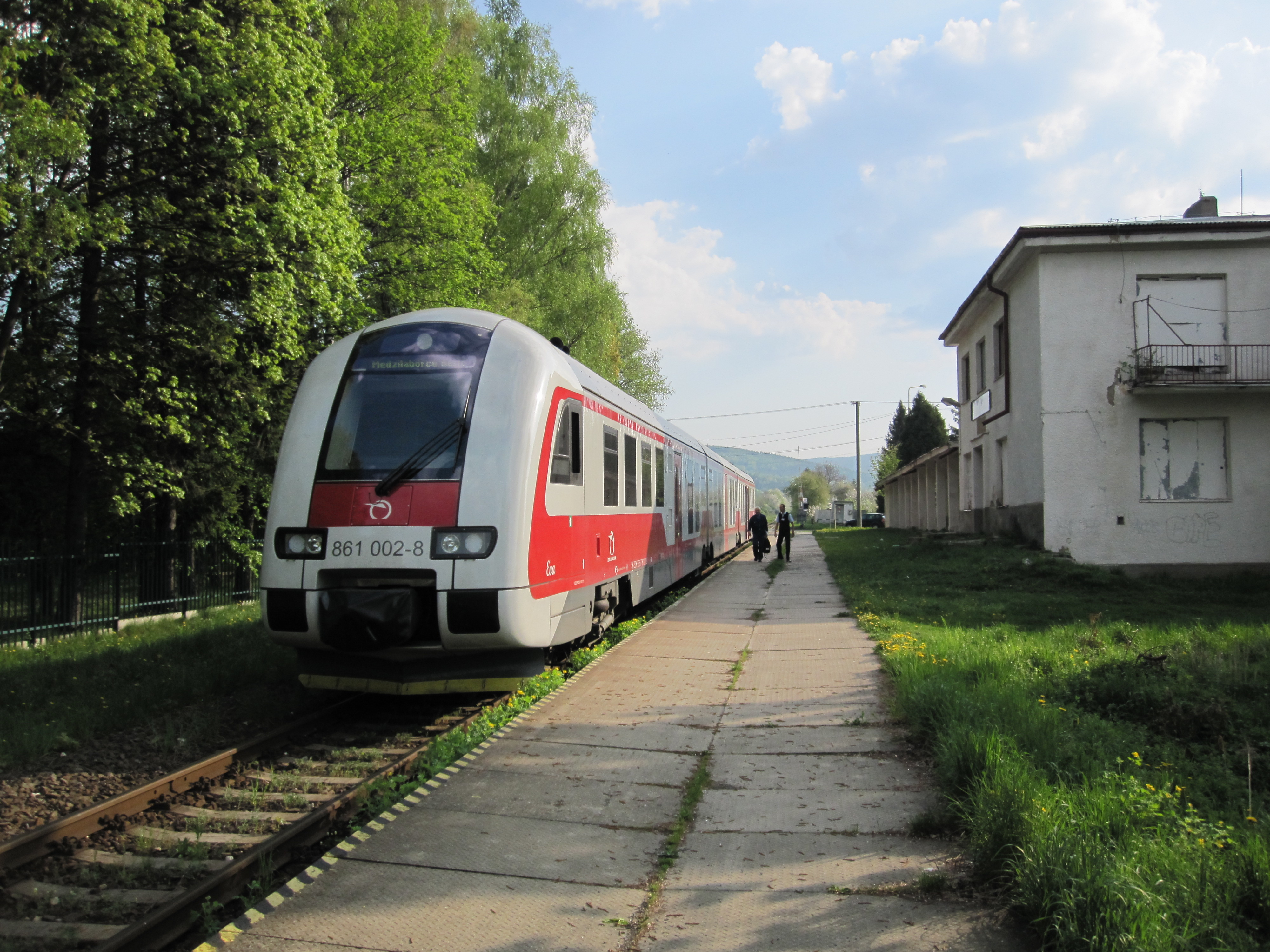 Motorová jednotka 861.002 Železniční společnosti Slovensko, zastávka Medzilaborce mesto, Medzilaborce